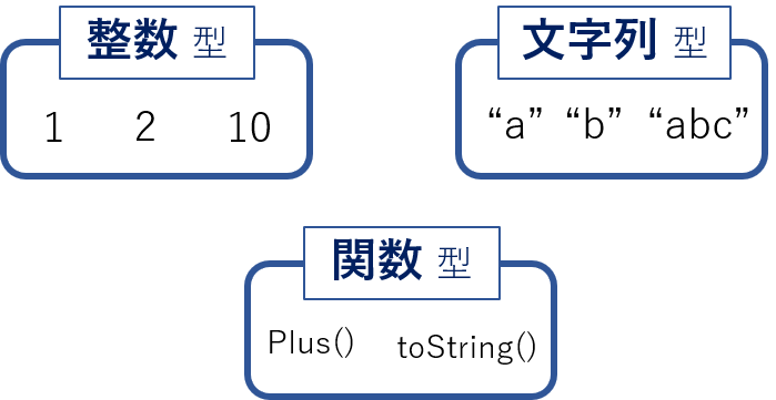 型の例示